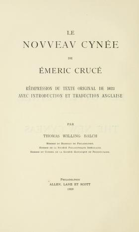 The new Cyneas of Émerie Crucé; späterre Auflage aus dem Jahr 1909